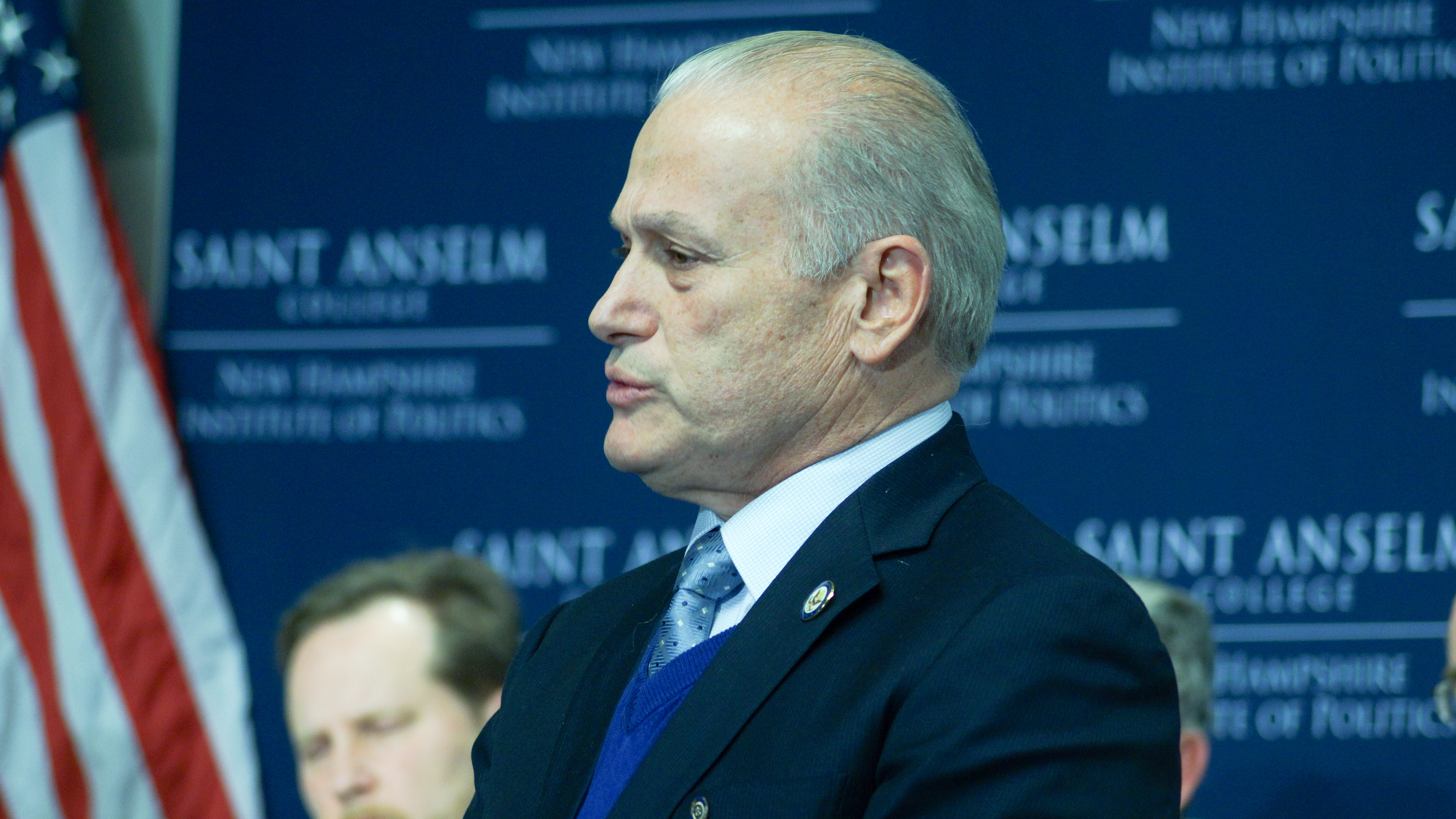 20160119-DSC07535